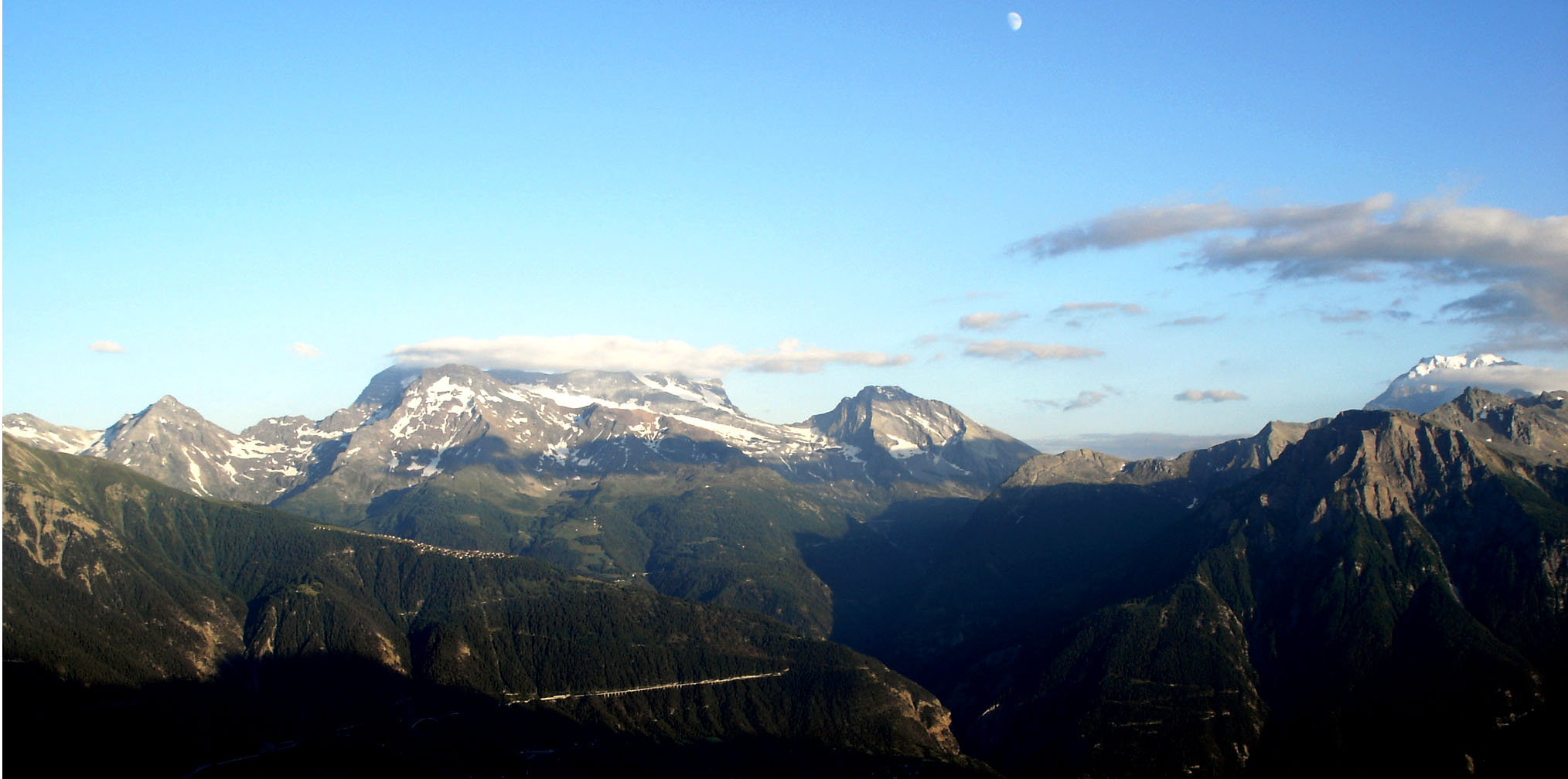 Monte Leone, Simplonpass und Fletschhorn, von der Belalp aus fotografiert